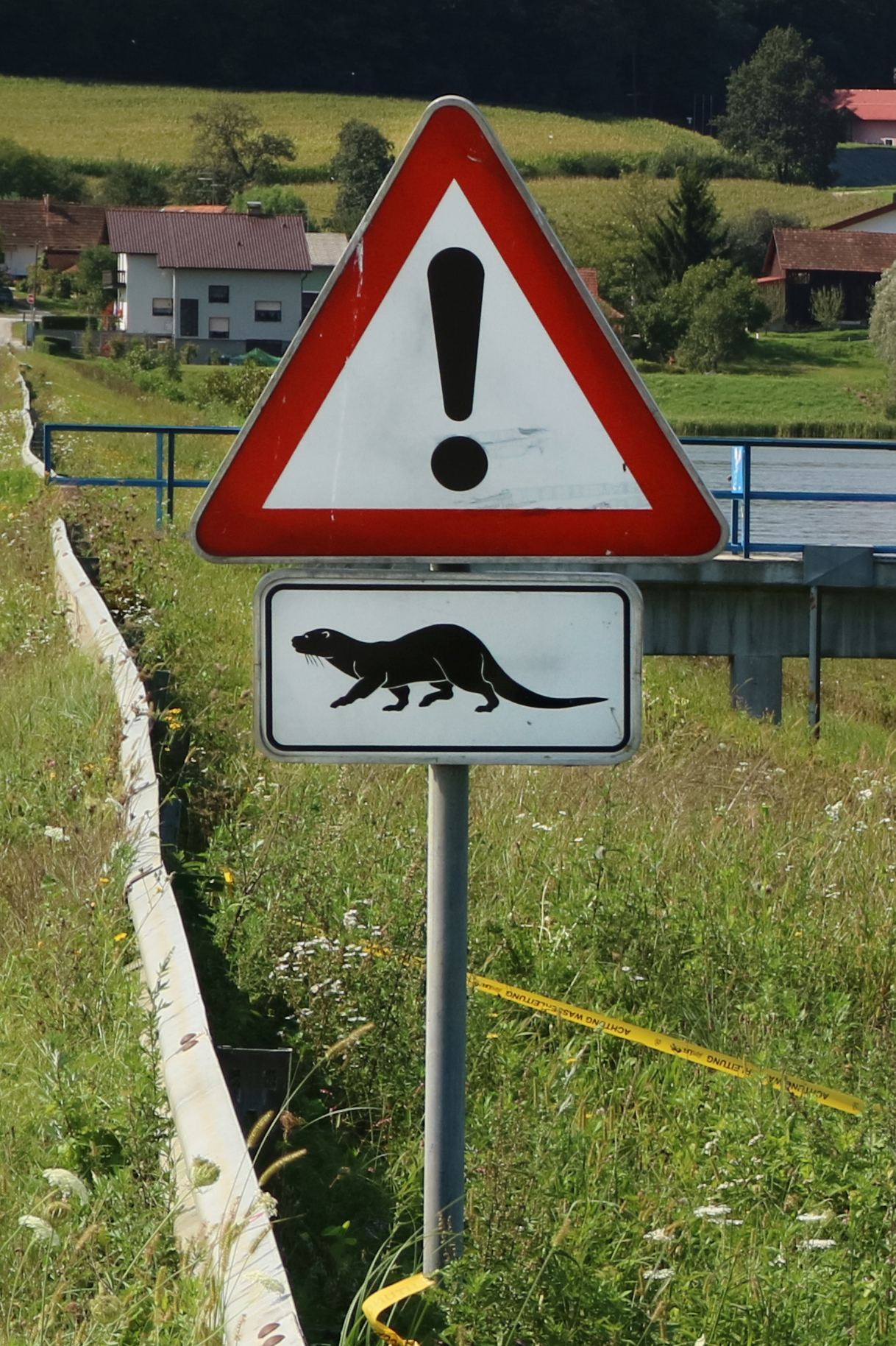 Fischotter-Warntafel am Ledavsko jezero, Gemeinde Cankova, Slowenien